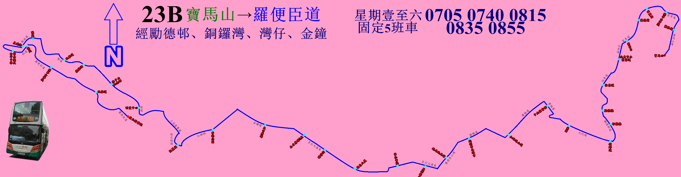 中文（香港）: 新巴23B線(往西半山方向)的走線圖